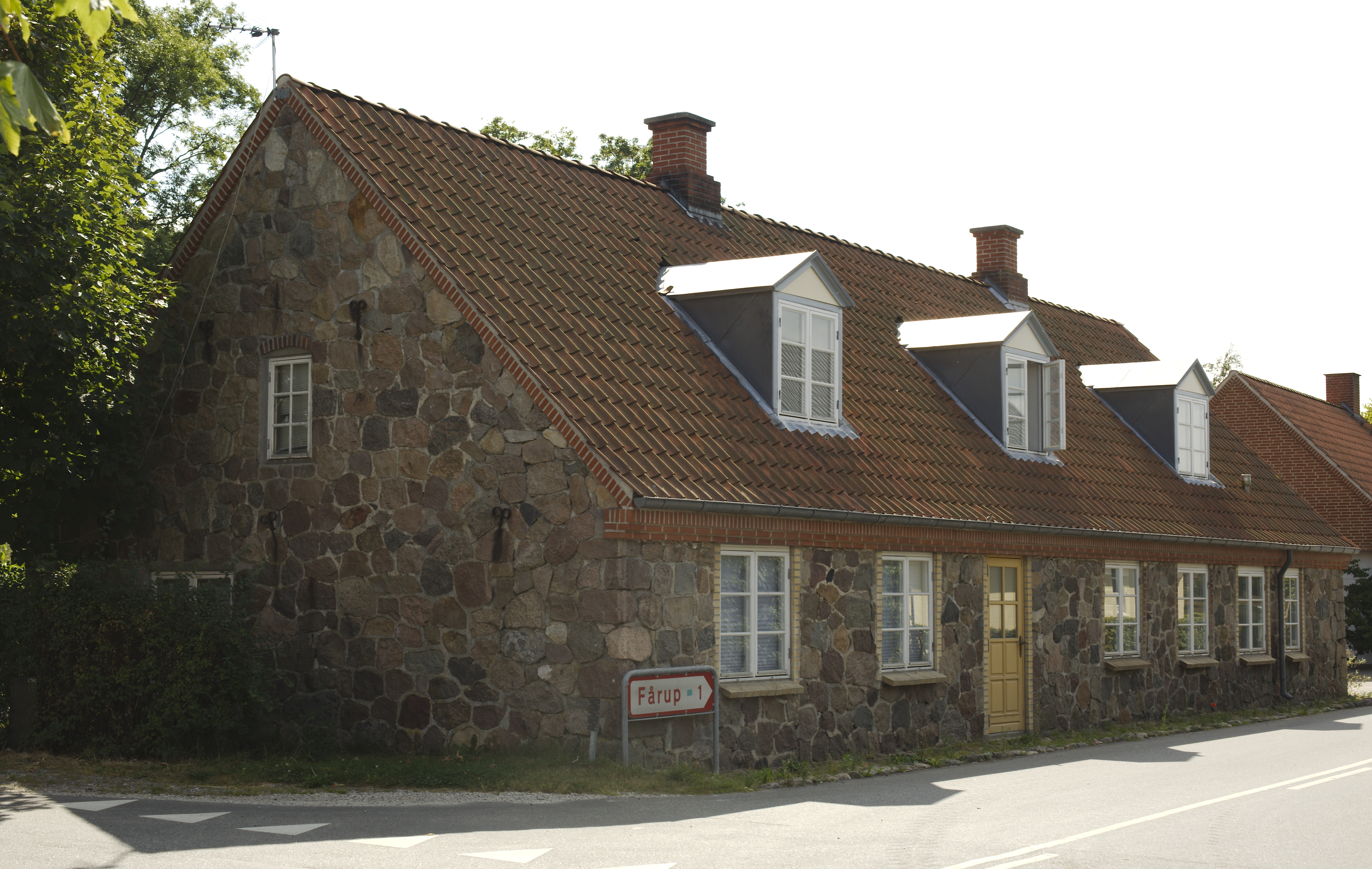 stuehus bygget af kløvet kamp